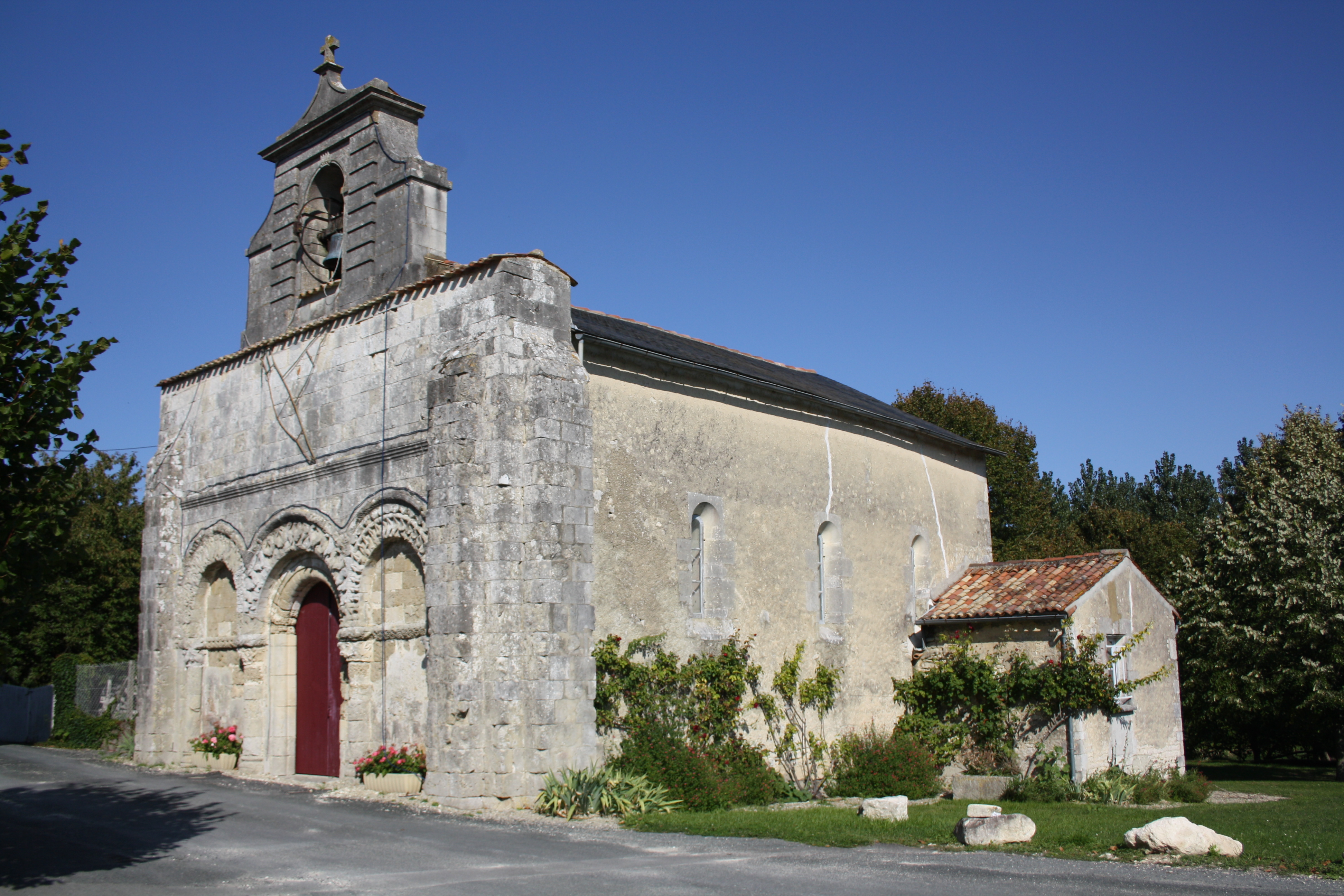 Eglise d'Antezant-la-Chapelle, Charente-Maritime (France).